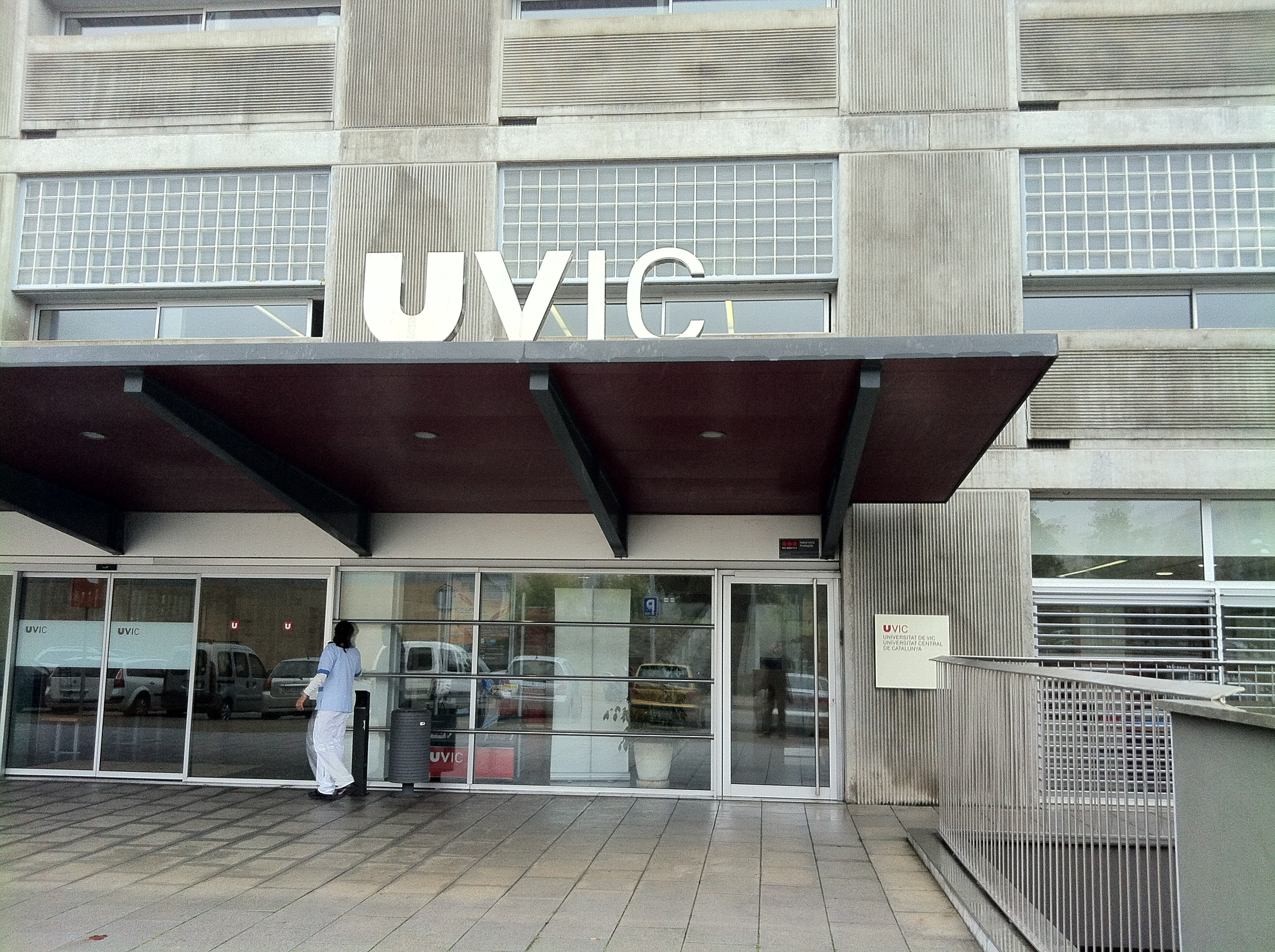 Universitat de Vic